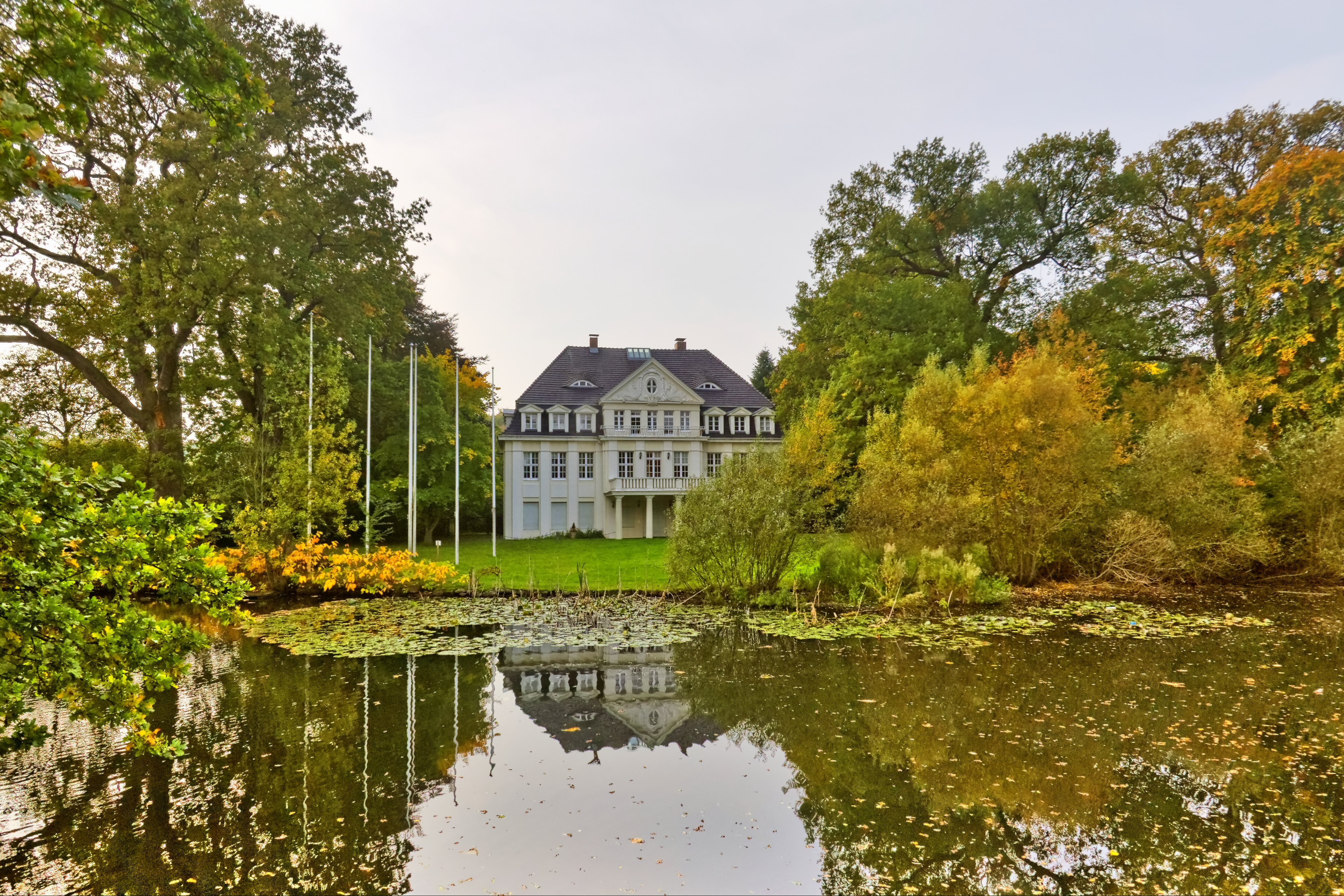 Altenhaus, Gut Stift; Herrenhaus